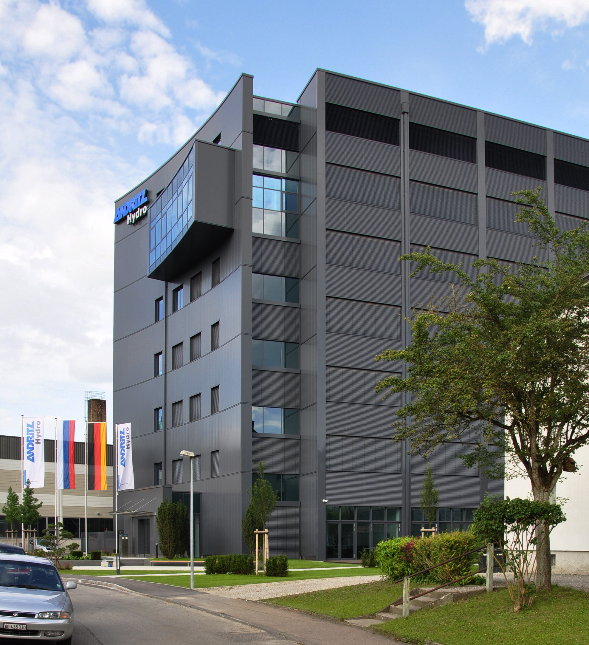 Ravensburg, ehemaliges Escher-Wyss-Gelände, Verwaltungsgebäude der Andritz Hydro